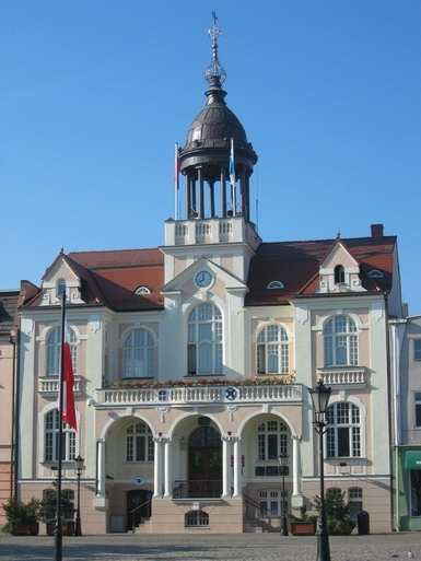 Ratusz w Wejherowie